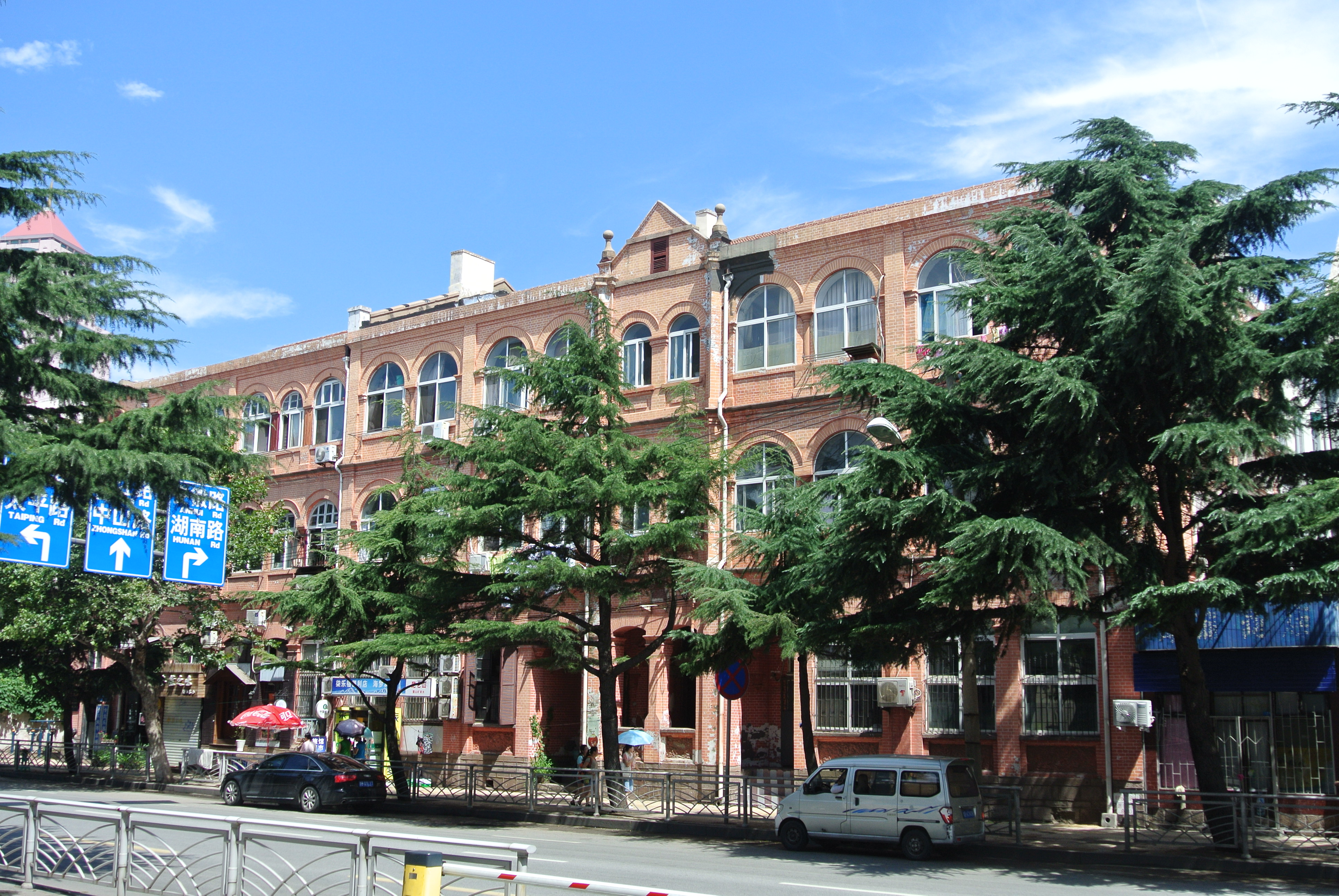 青岛广西路11号祥福洋行公寓